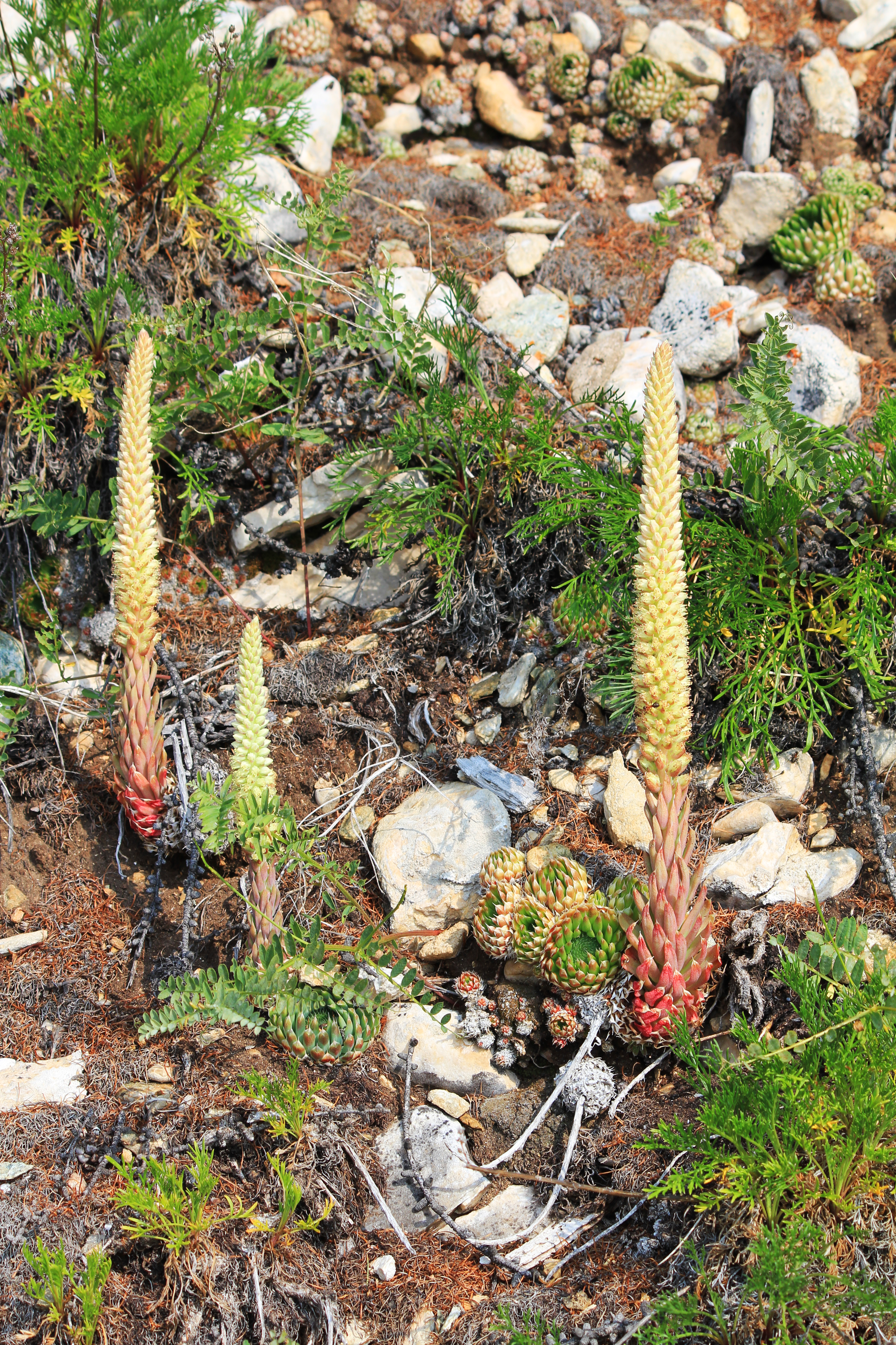 Ушканьи острова: Баргузинский район, Бурятия This image is related to the protected area of Russia number 0310010